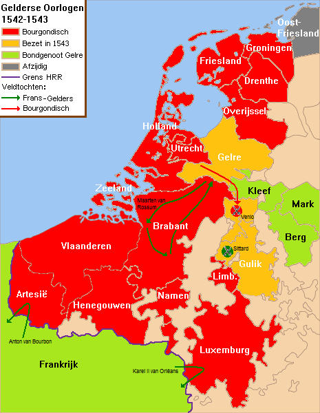 Overzicht Gelderse Oorlogen in 1542 en 1543, met de Franse invallen en de plundertocht van Maarten van Rossum door Brabant, de Bourgondische veldtocht door het Gelderse rivierengebied en de veldslagen bij Sittard en Venlo.